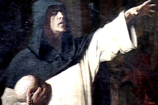 Savonarola, gemalt von Ludwig von Langenmantel (Ausschnitt aus Großgemälde)